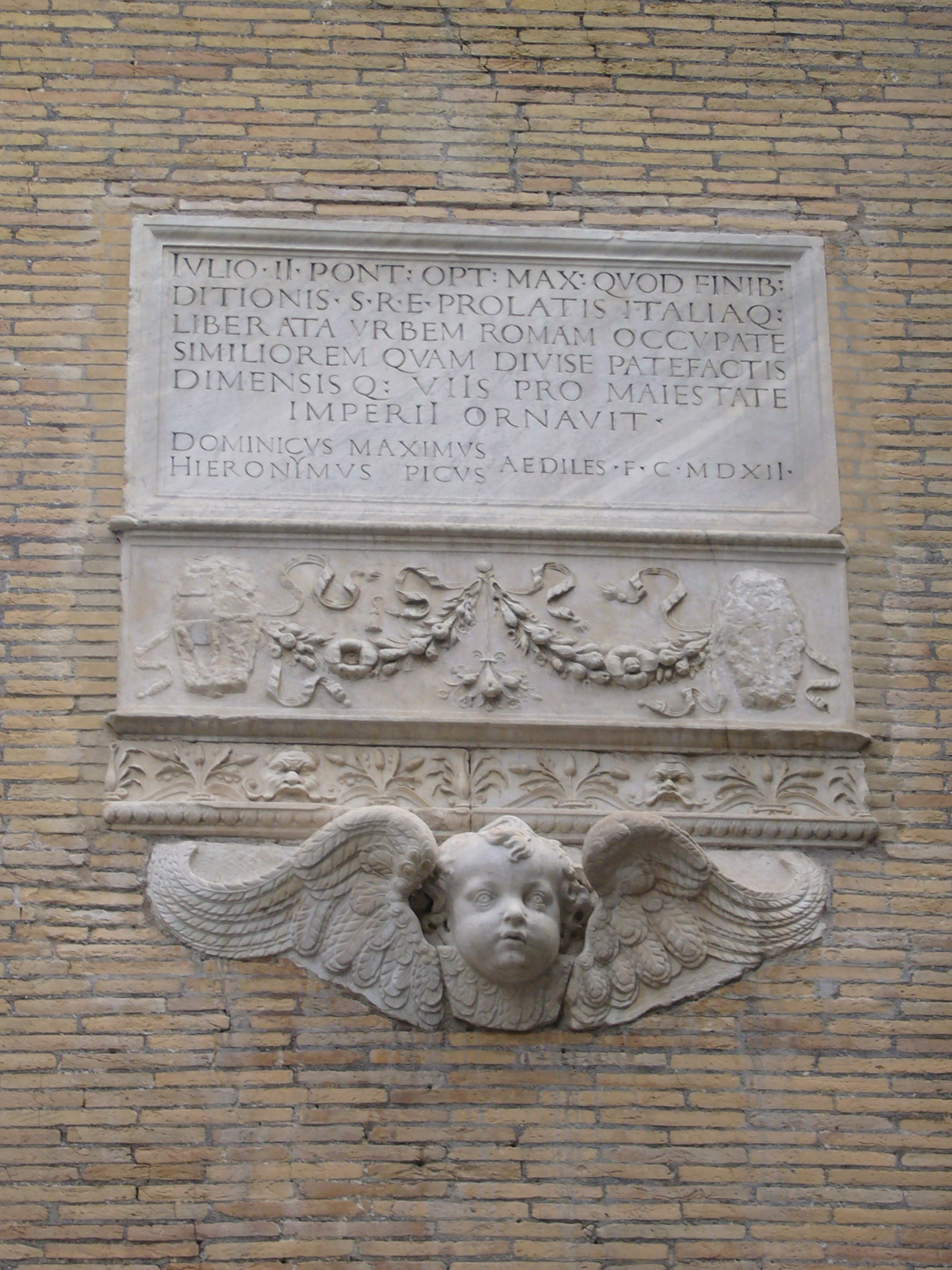 Roma, via del Banco di S. Spirito: memoria dei lavori di Giulio II (1512)